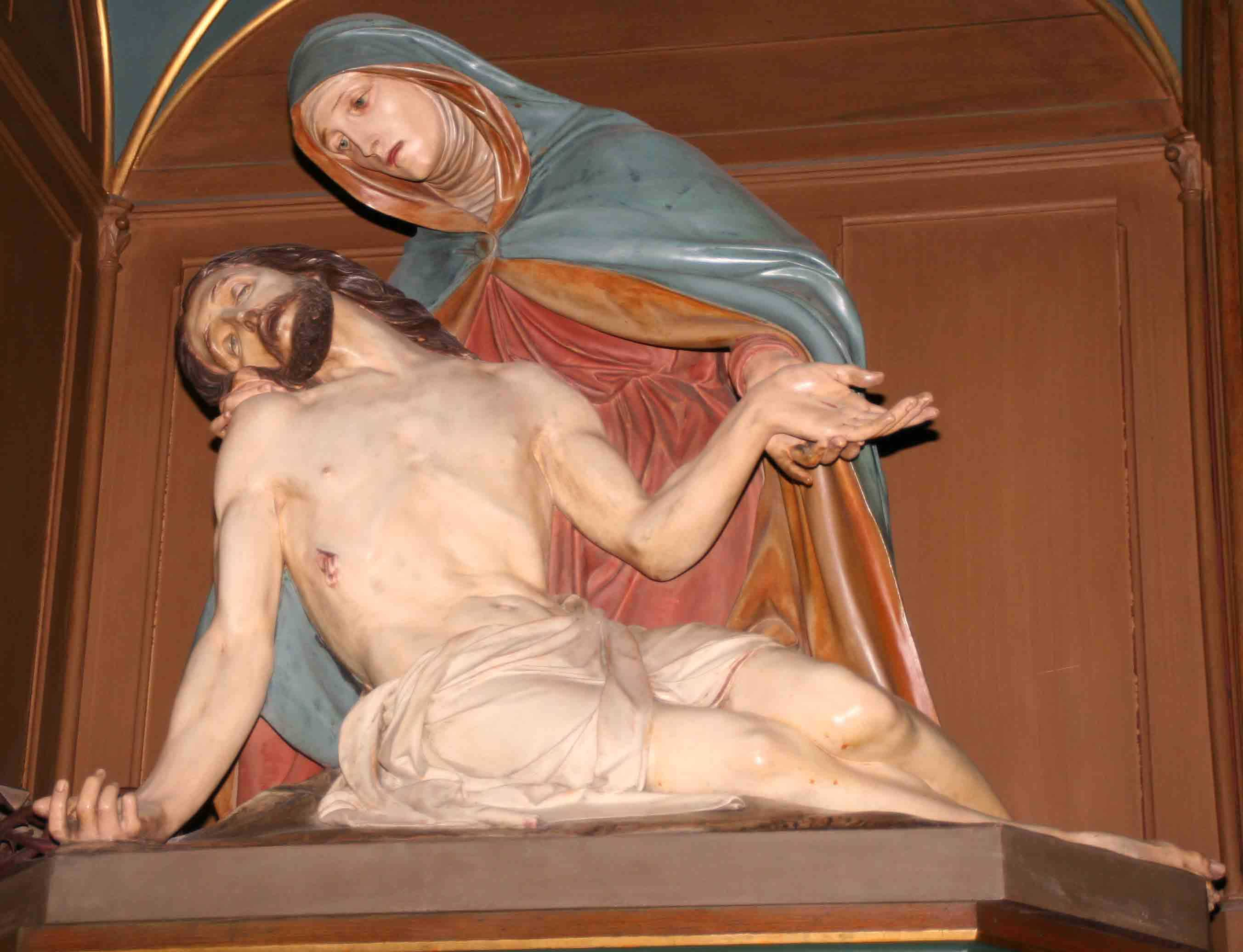 Pietà an der Jousefskierch zu Esch.